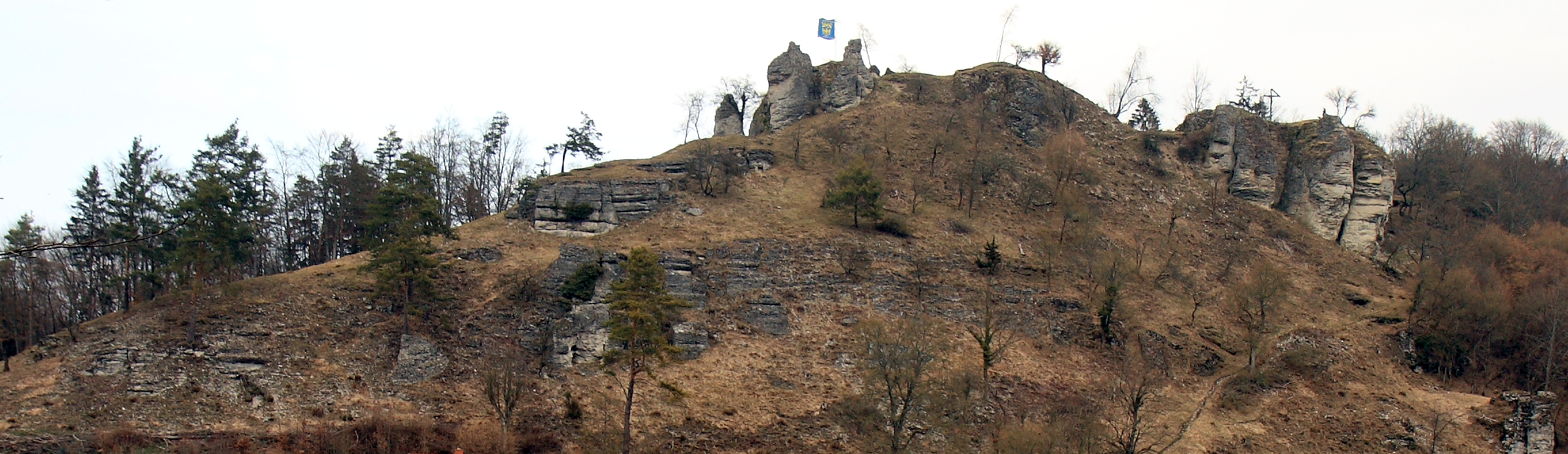 Burgstall Niesten - Ansicht des Burgberges